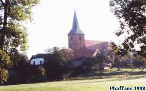 Vue de l'église de Phaffans